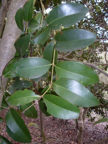 Acmena hemilampra, leaves